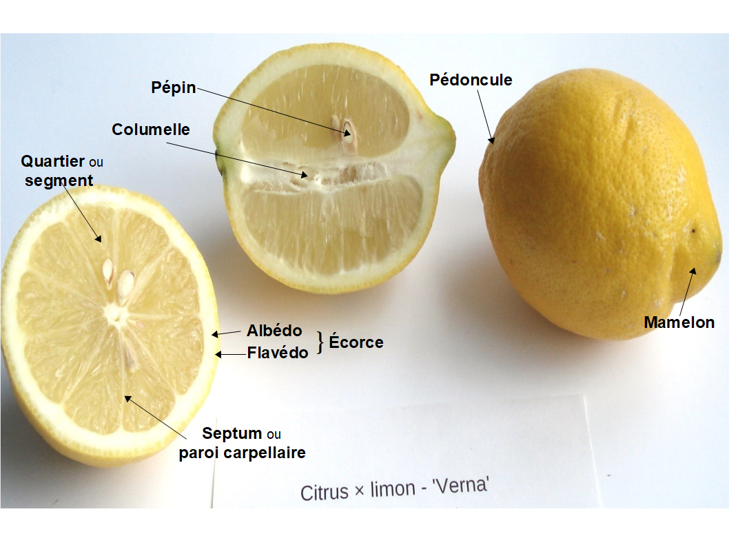 Parties du citron (coupe transversale, longitudinale et aspect externe)